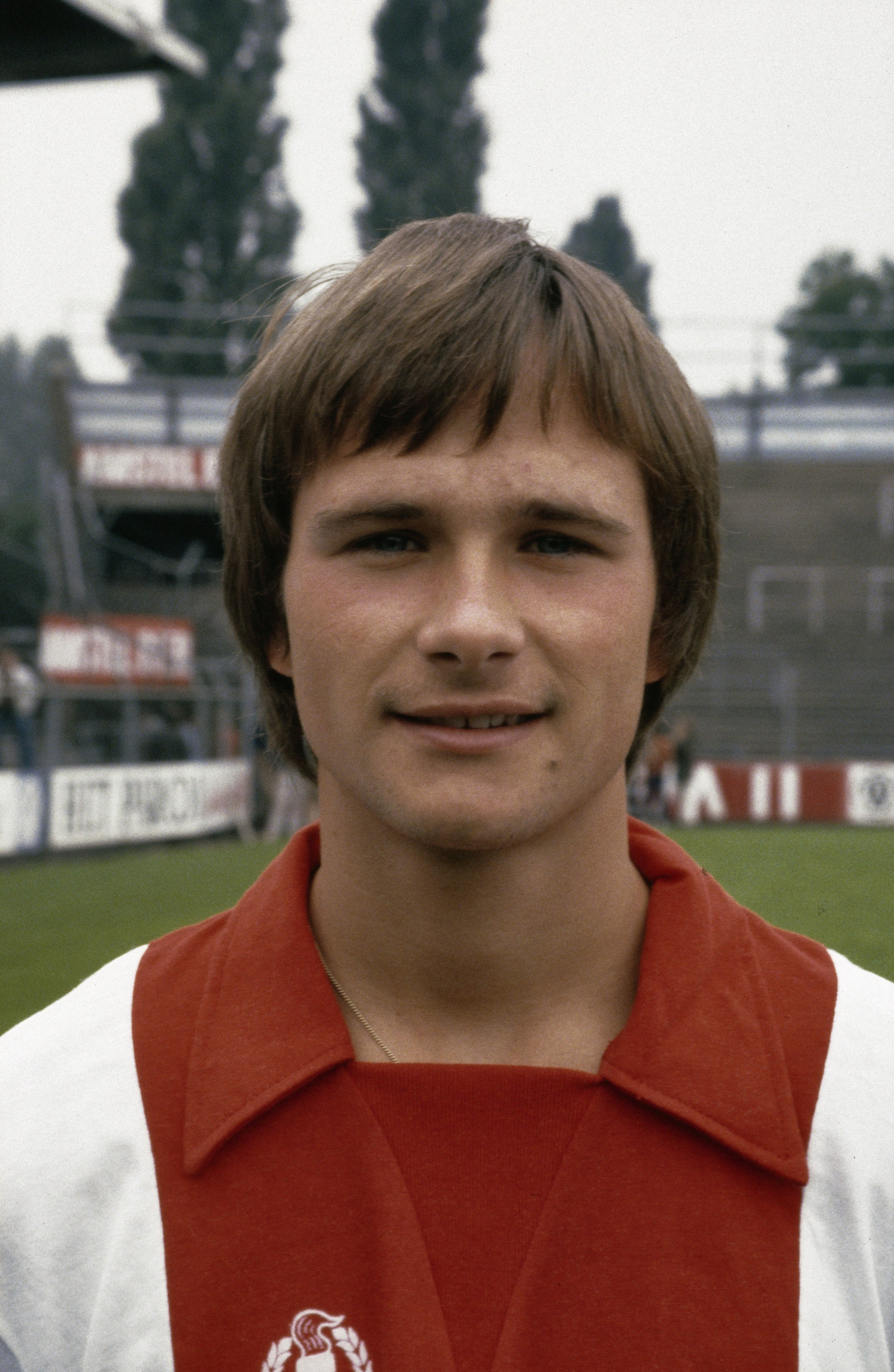 Collectie / Archief : Fotocollectie Anefo Reportage / Serie : [ onbekend ] Beschrijving : Presentatie Ajax selectie 1979/1980 ; nr. 26 : Boeve, nr. 27 : Zwambornpen Datum : 8 oktober 1978 This date is not correct. Trefwoorden : selecties, sport, voetbal Persoonsnaam : boeve, zwamborn Fotograaf : Dijk, Hans van / Anefo Auteursrechthebbende : Nationaal Archief Materiaalsoort : Dia (kleur) Nummer archiefinventaris : bekijk toegang 2.24.01.06 Bestanddeelnummer : 253-8071